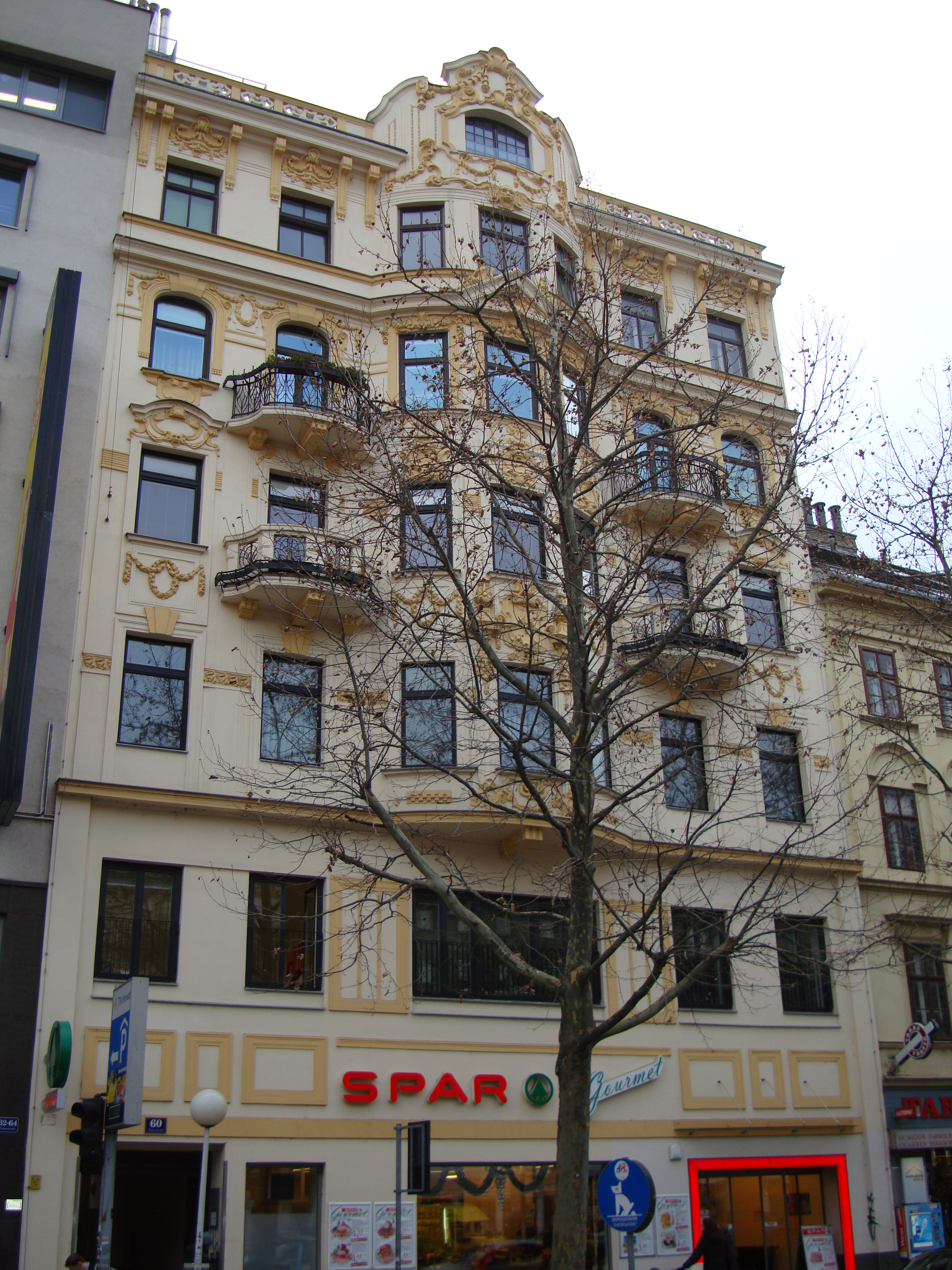 Wien Praterstrasse 60